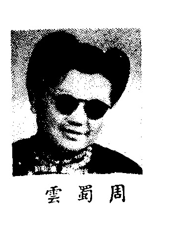 中文（中国大陆）: 制憲國民大會代表